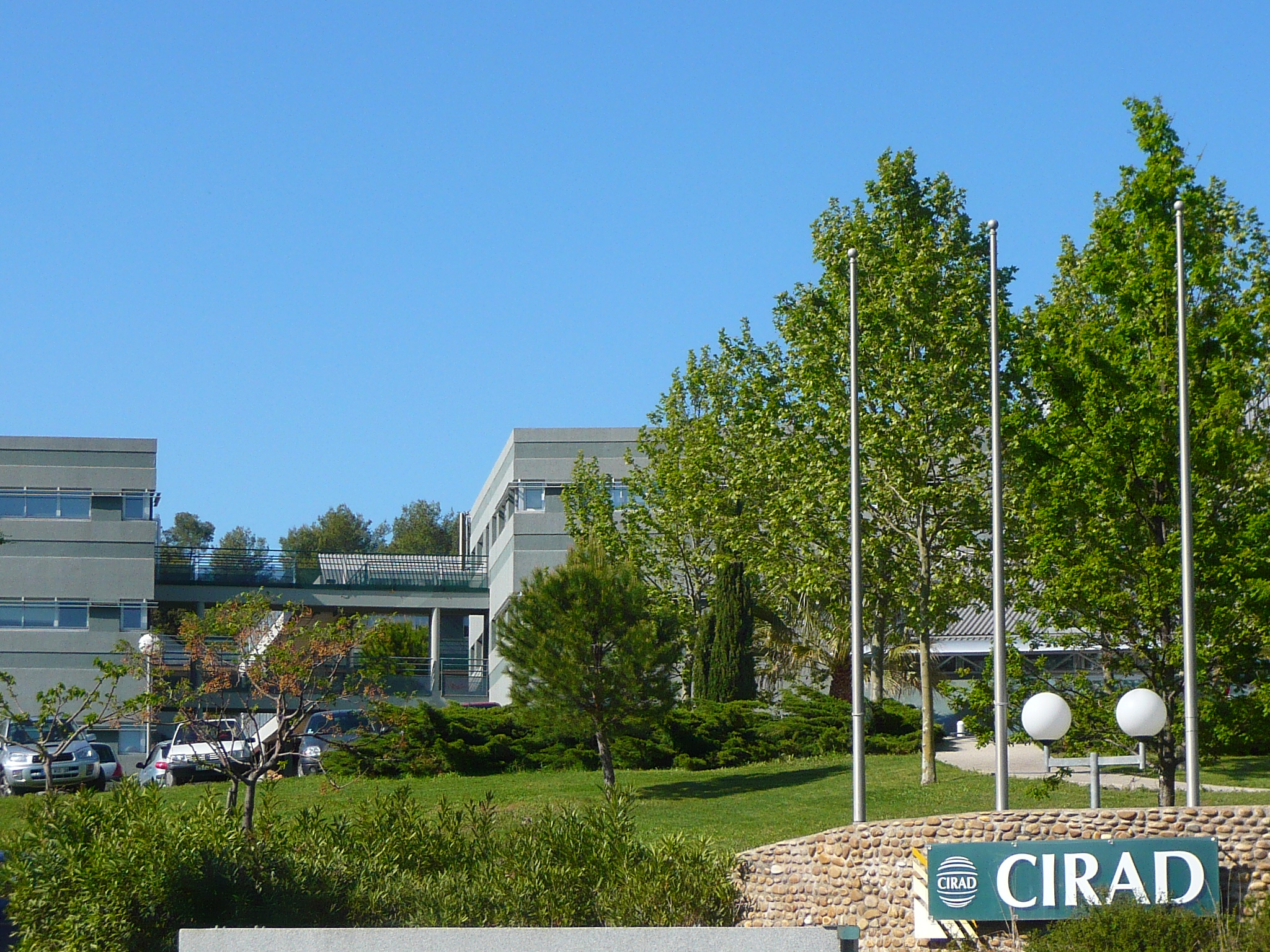 La façade du CIRAD à Baillarguet, Montferrier-sur-Lez, Hérault, France.